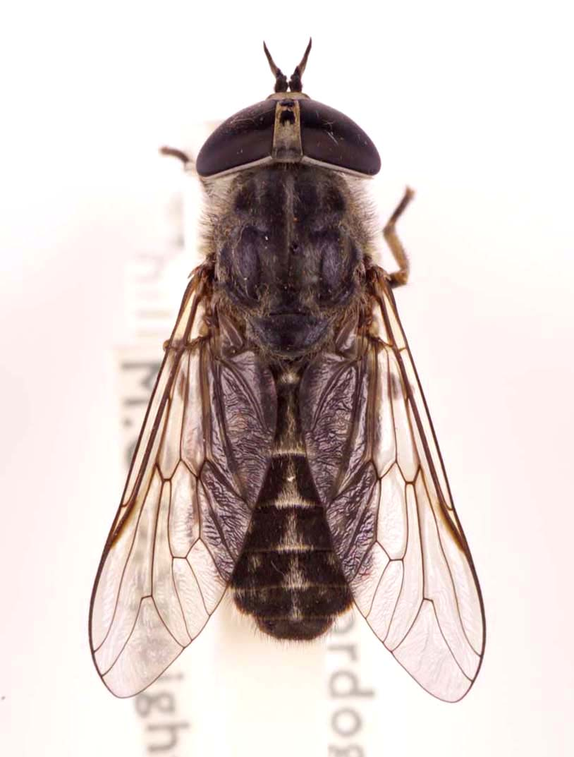 Tabanus unifasciatus France